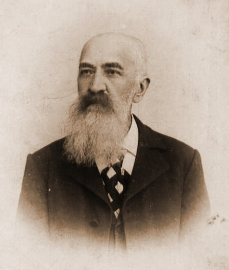 Dr. Alexandru A. Sutu